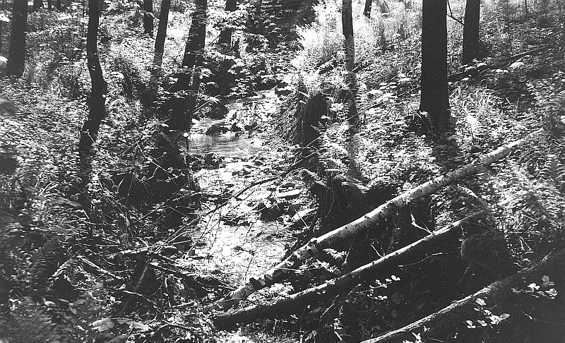 Original image description from the Deutsche FotothekTriebischtal-Munzig. Bergbau, im Diebesgrund